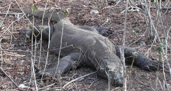 Ein Komodowaran, Komodo